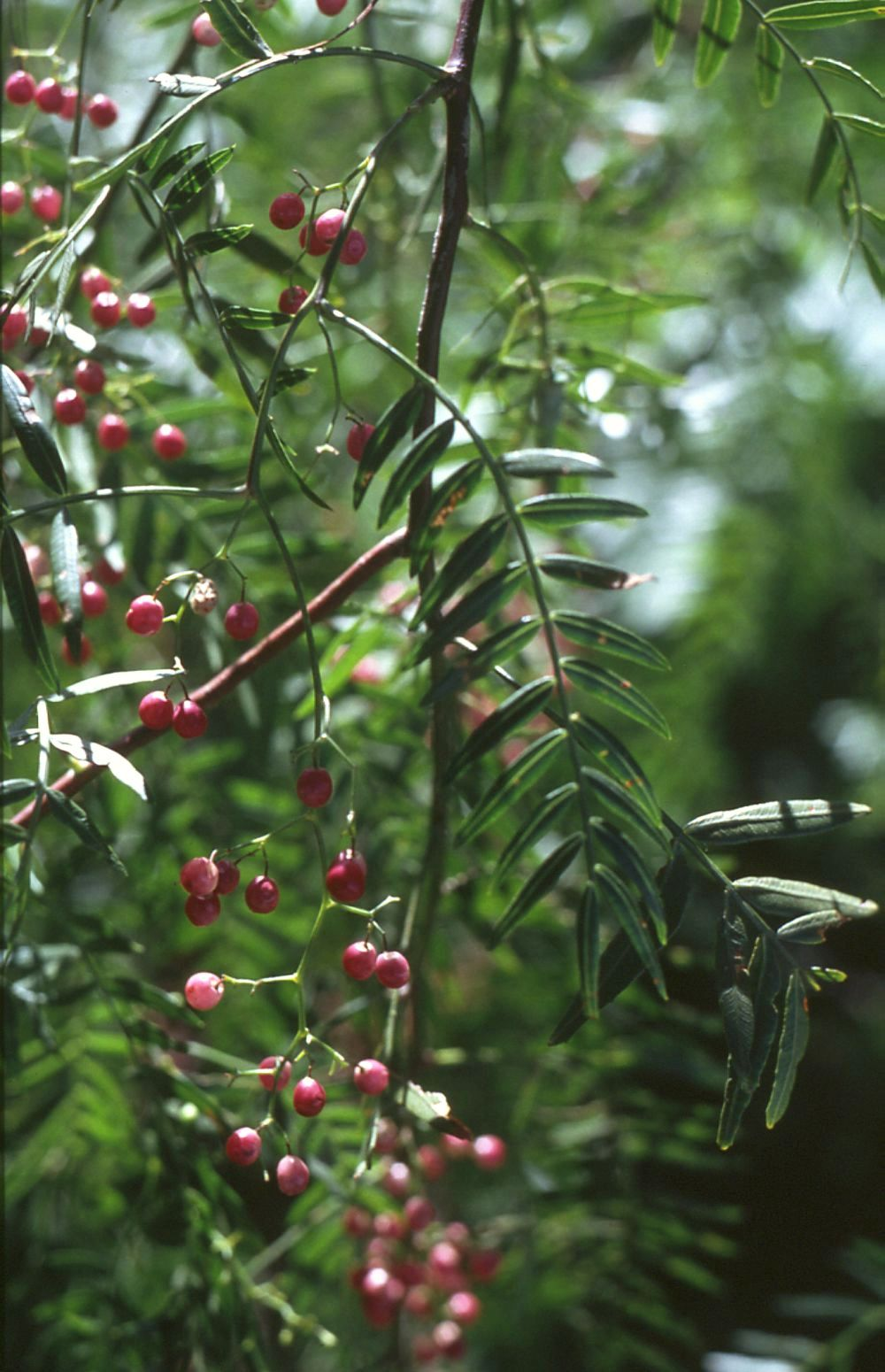 Peruanischer Pfefferbaum (Schinus molle), Sumachgewächse (Anacardiaceae) - Argentinien/Argentina, San Luis (Prov. San Luis)